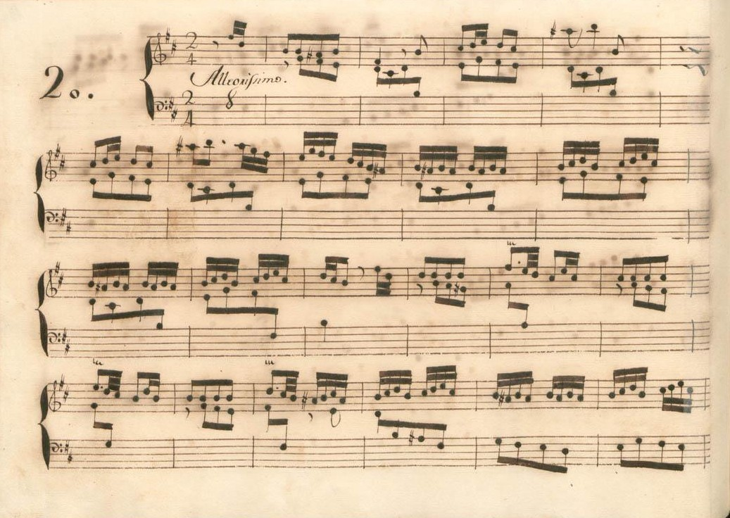 La sonate K. 377, telle qu'elle se présente dans le manuscrit de Parme, volume X no. 20.